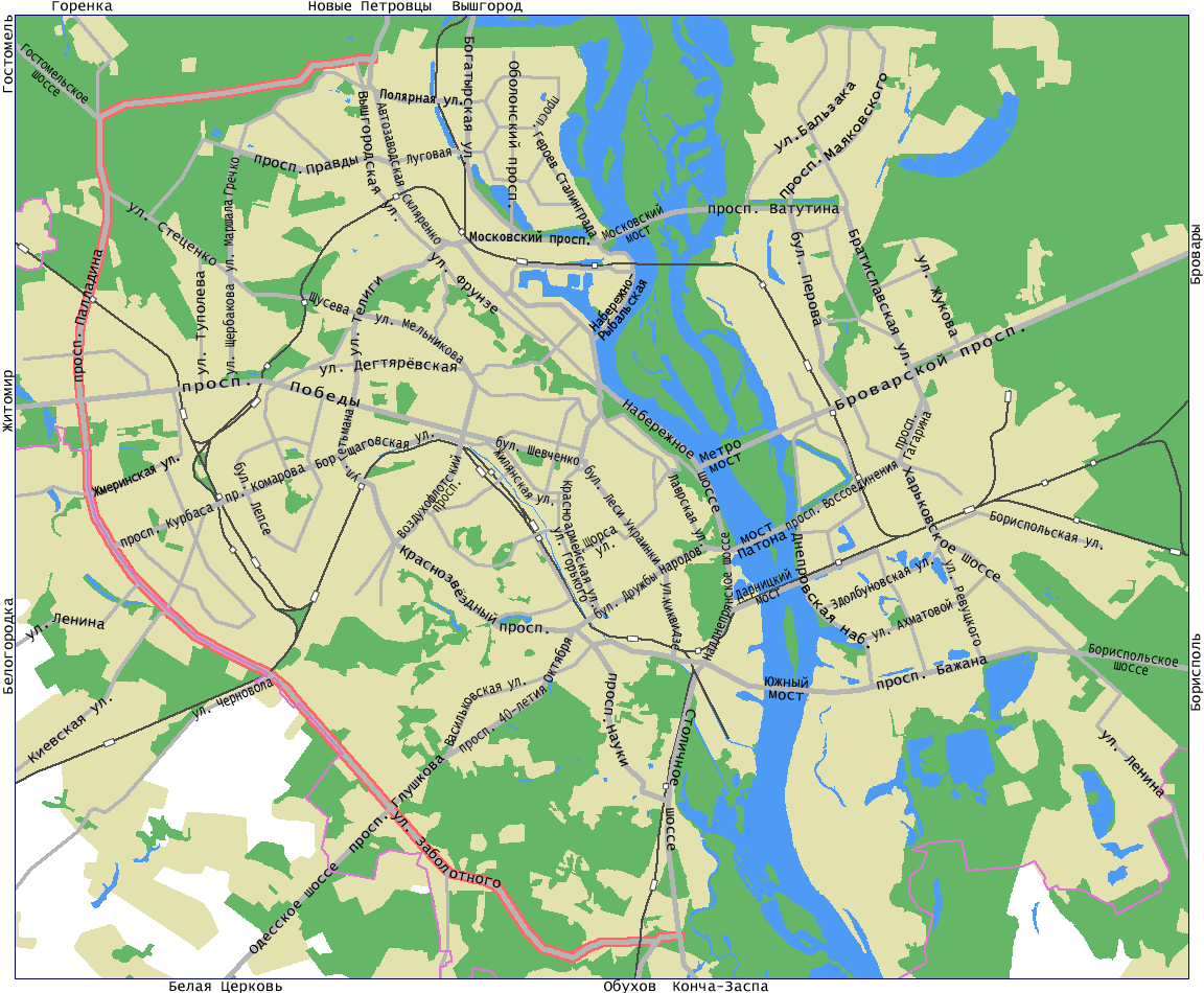 г. Киев